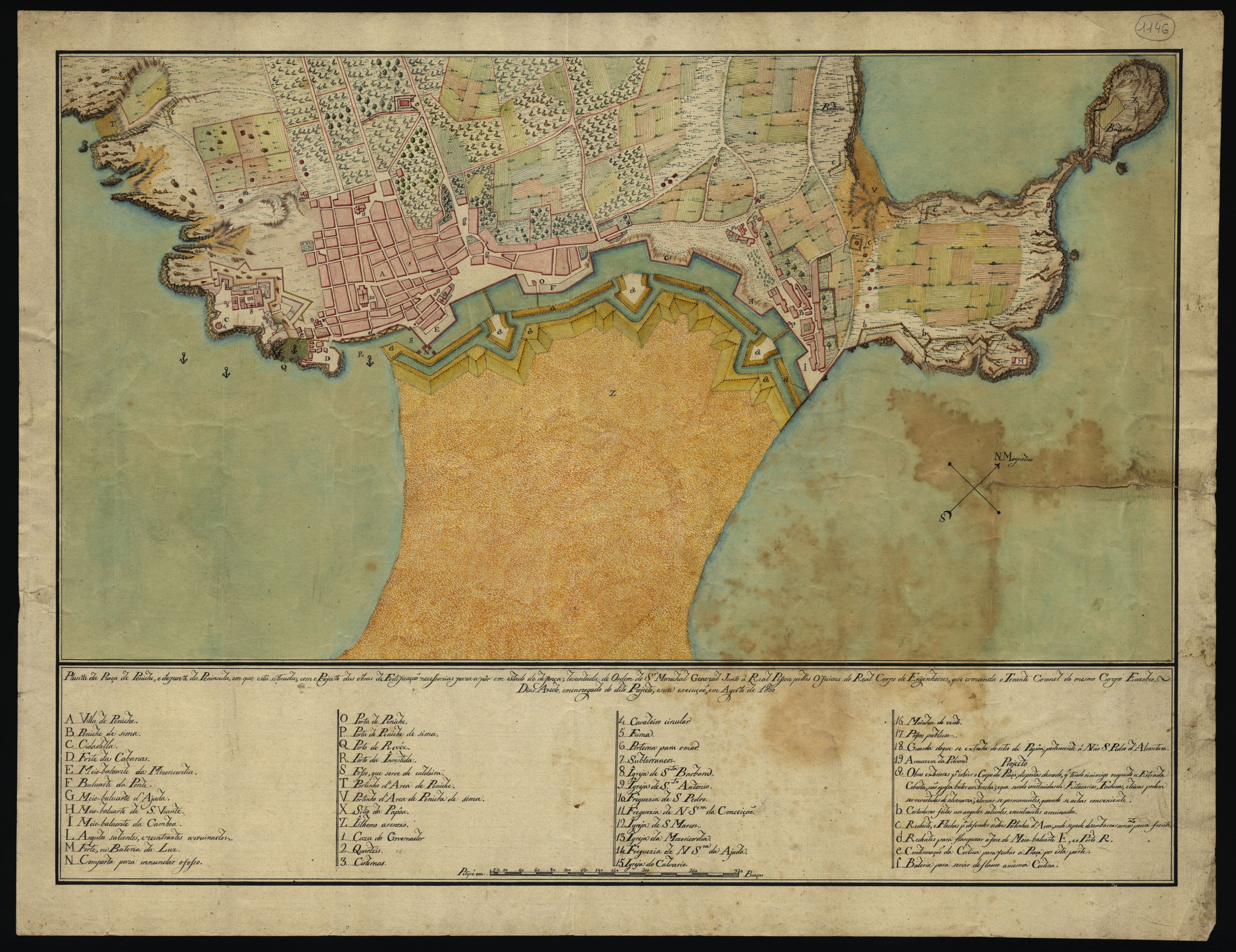 Planta da Praça de Peniche, e de parte da Peninsula, em que está situada, com o projecto das obras de fortificação necessarias para a pôr em estado de defensa [Material cartográfico] / levantada de ordem do Sr. Marechal General junto á Real Pessoa pelos oficiaes do Real Corpo de Engenheiros, que comanda o Tenente Coronel do mesmo Corpo Euzebio Dias Azedo, encarregado do dito projecto, e sua execução. - Escala [ca. 1:5400], 320 Braças = [13 cm] Agosto de 1800. - 1 planta : manuscrita, aguarelada ; 32,00x58,50cm, em folha de 48,00x62,50 cm